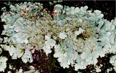 Flavoparmelia caperata